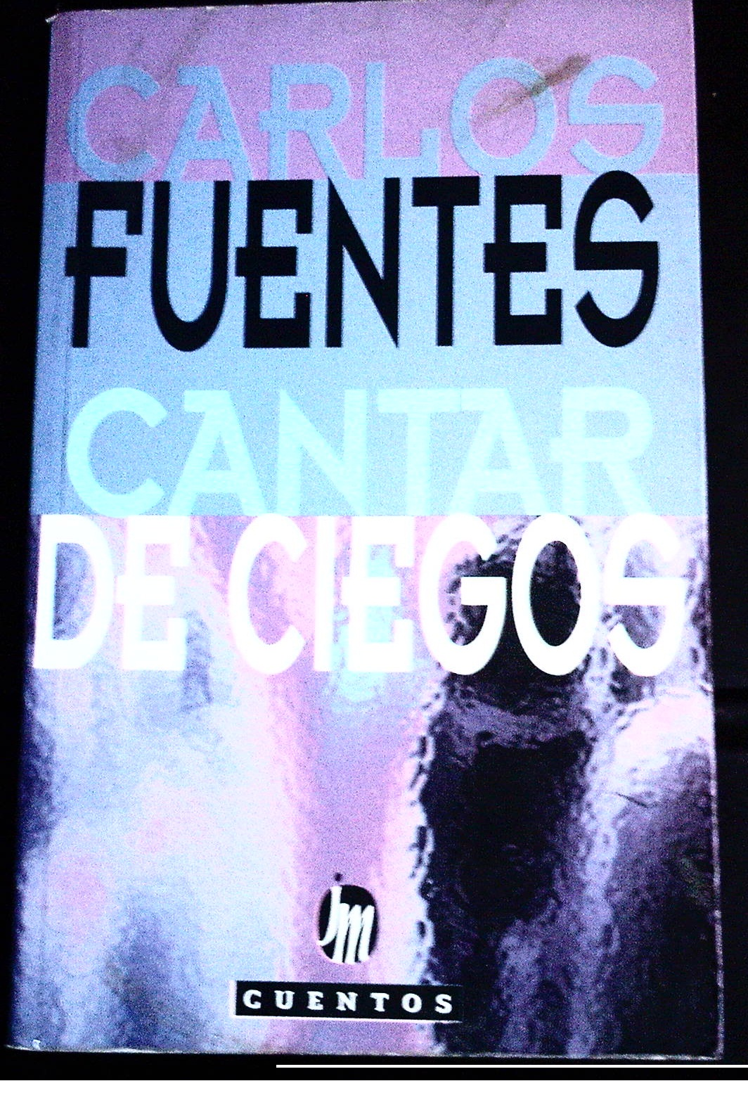 Portada del libro "Cantar de Ciegos" del escritor mexicano Carlos Fuentes.